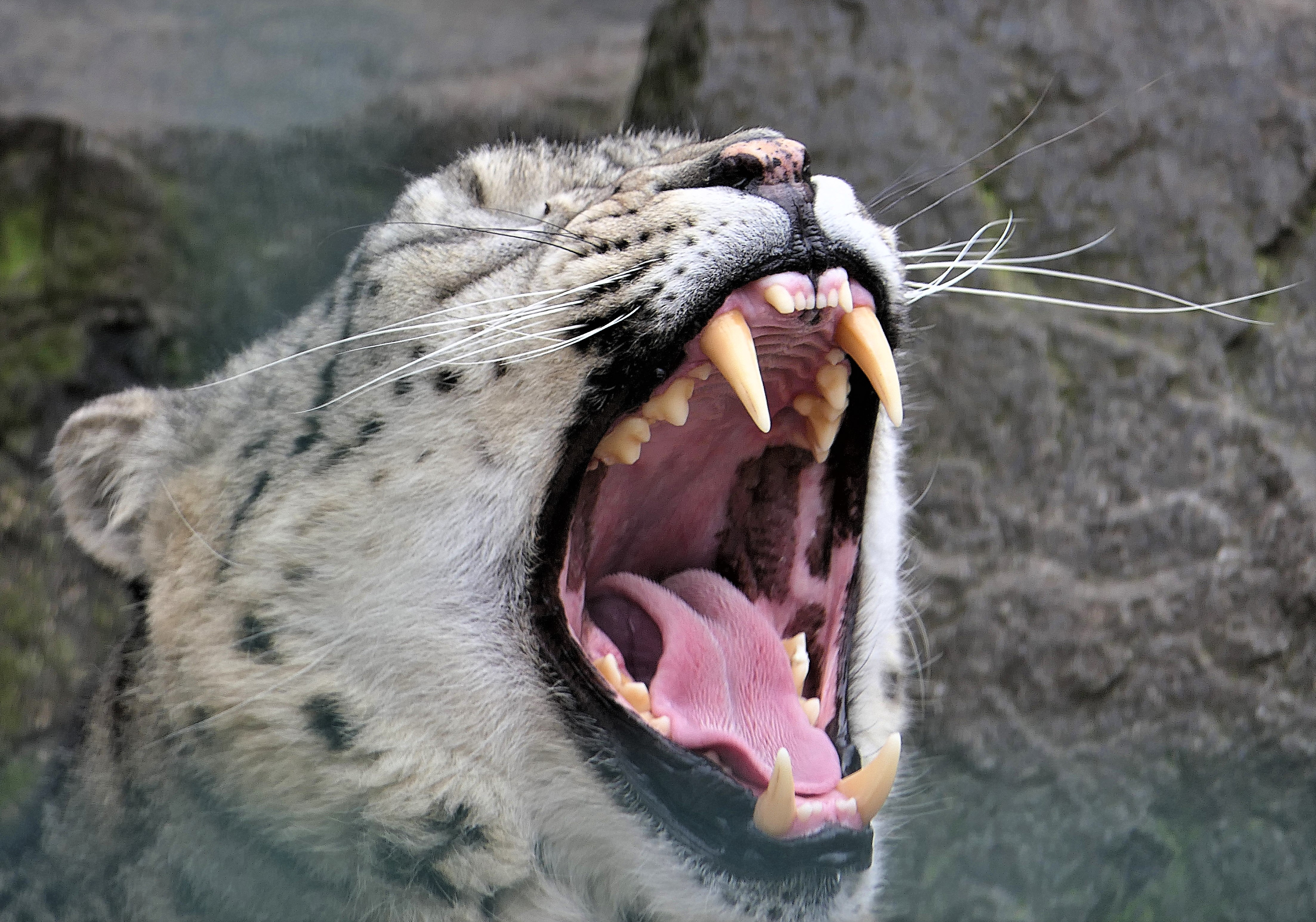 Schneeleopard Etwas zur Schärfe: mit leichtem Digitalzoom - rel.KB 610mm - und mit 1/50 sec - das ist trotz Stabi etwas lang - daher die leichte Unschärfe.